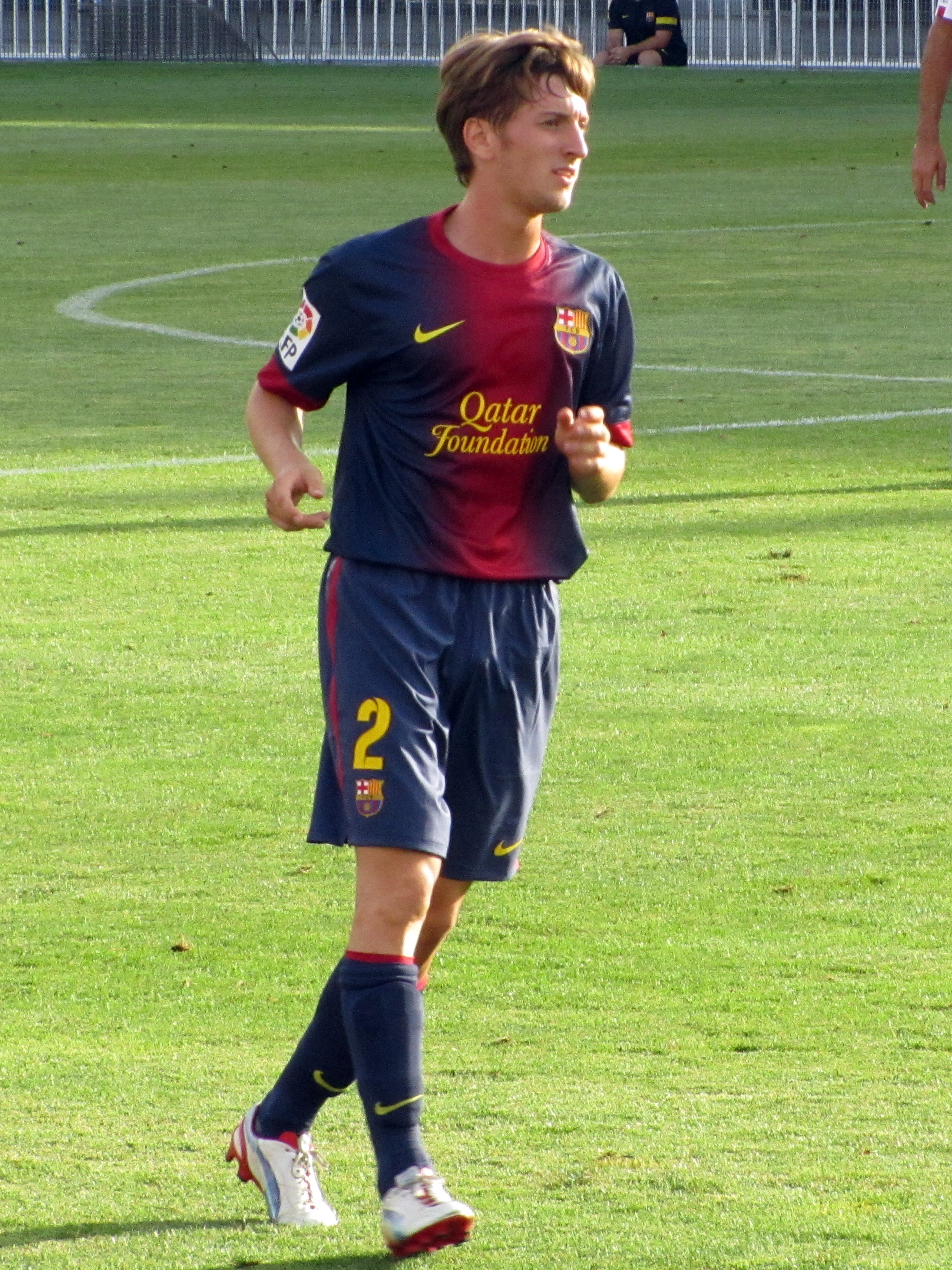 Foto realizada por Javier Segura (@castroquini en Twitter)